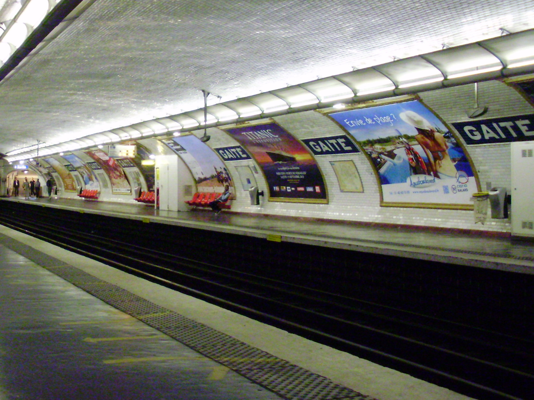 Station Gaîté du métro de Paris : quai de la station en direction du nord de la ligne 13 du métro, à Paris 14e, France.